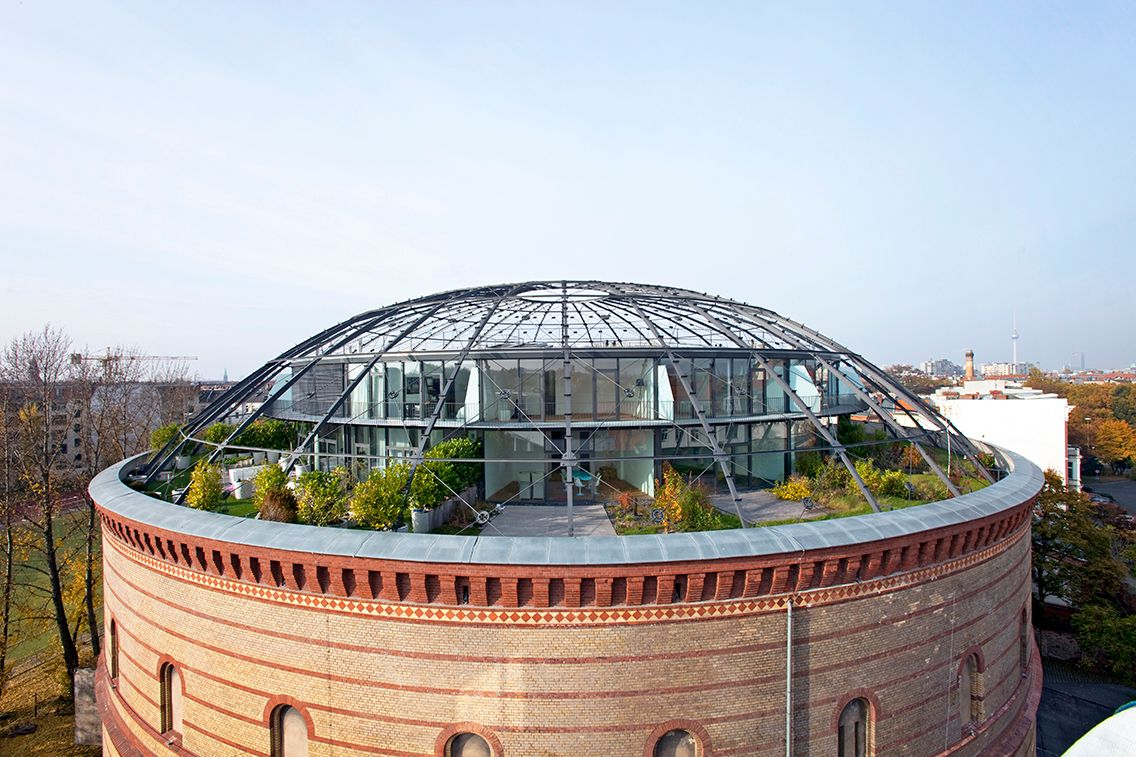 Der Fichtebunker ist der älteste und einzige erhaltene Steingasometer in Berlin